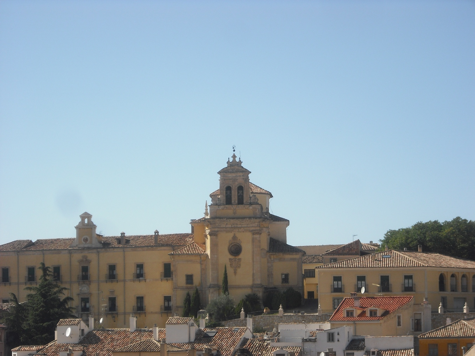 Hospital de Santiago.